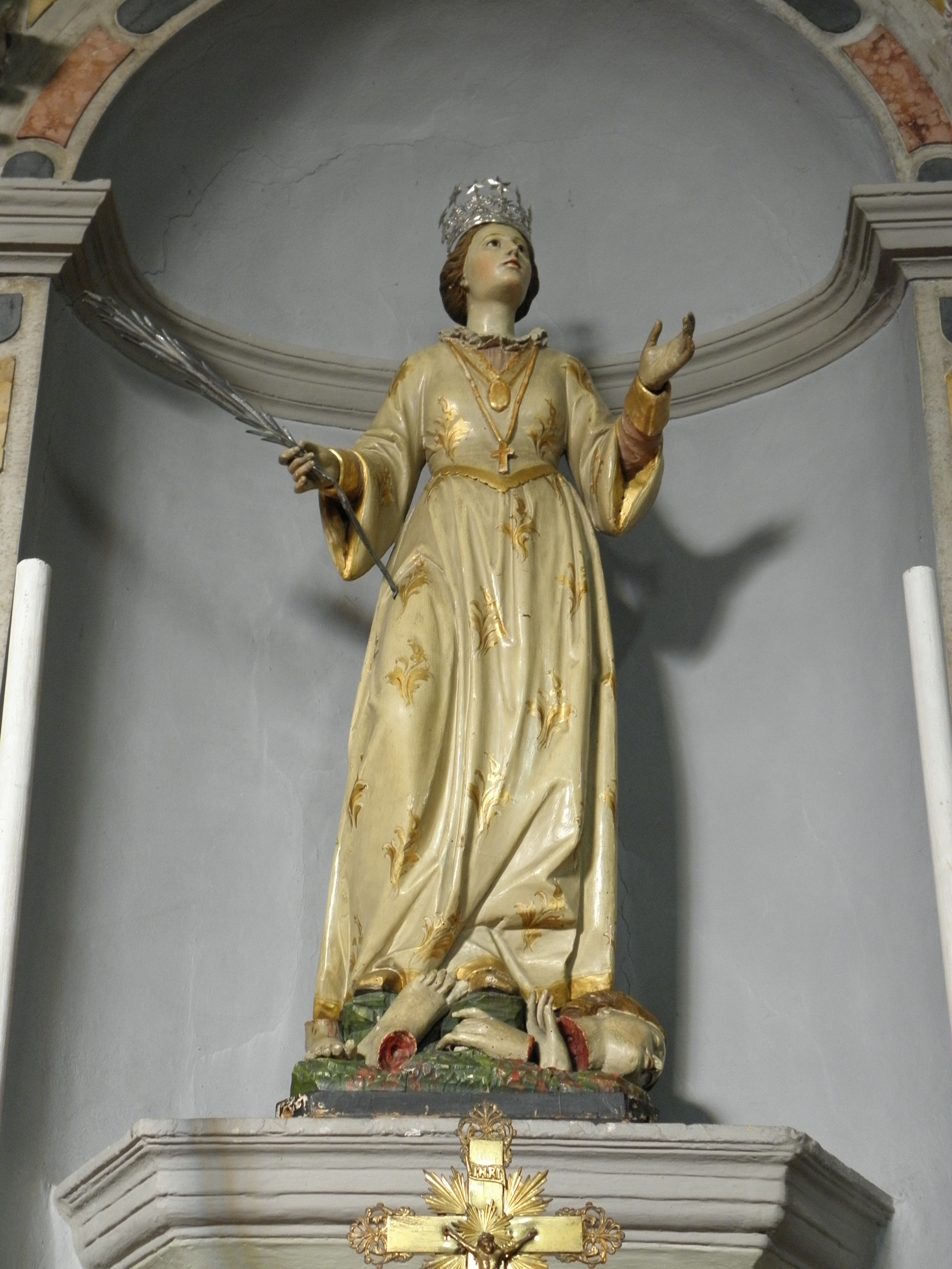 Bellombra, già comune e dal 1928 frazione di Adria. Chiesa di San Giacomo Apostolo, interno, statua di Sant'Eurosia sita nell'omonimo altare.